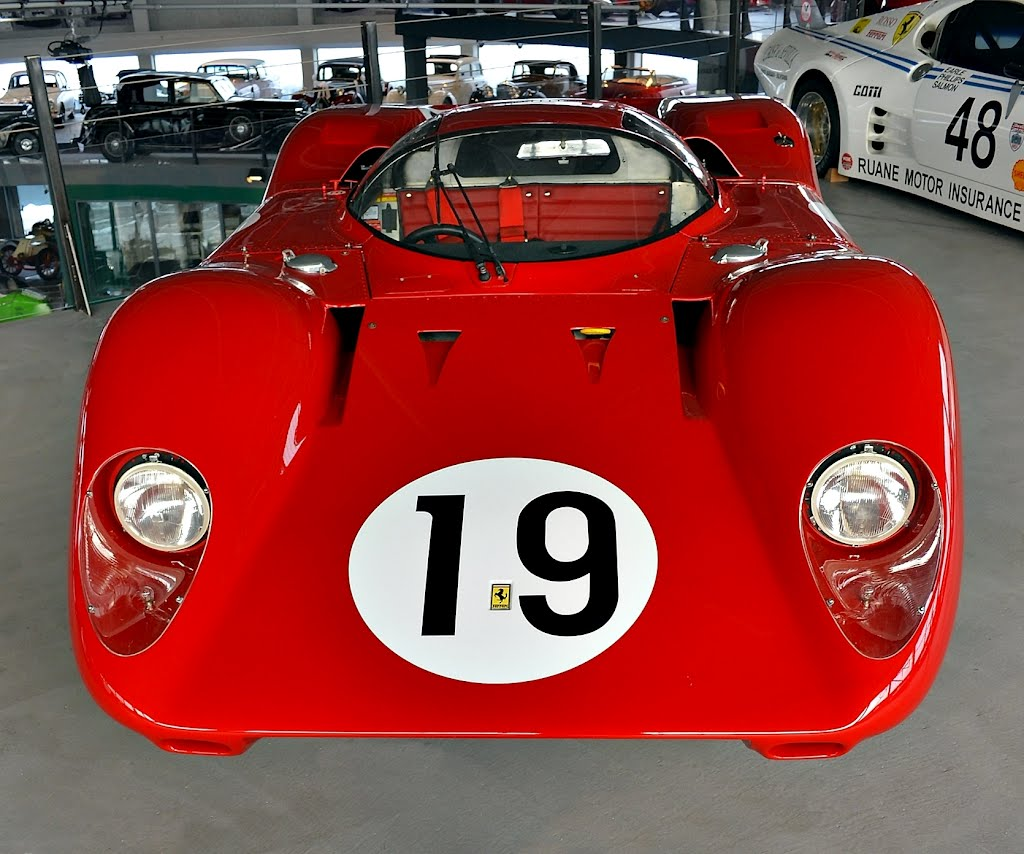 Ferrari 312-P